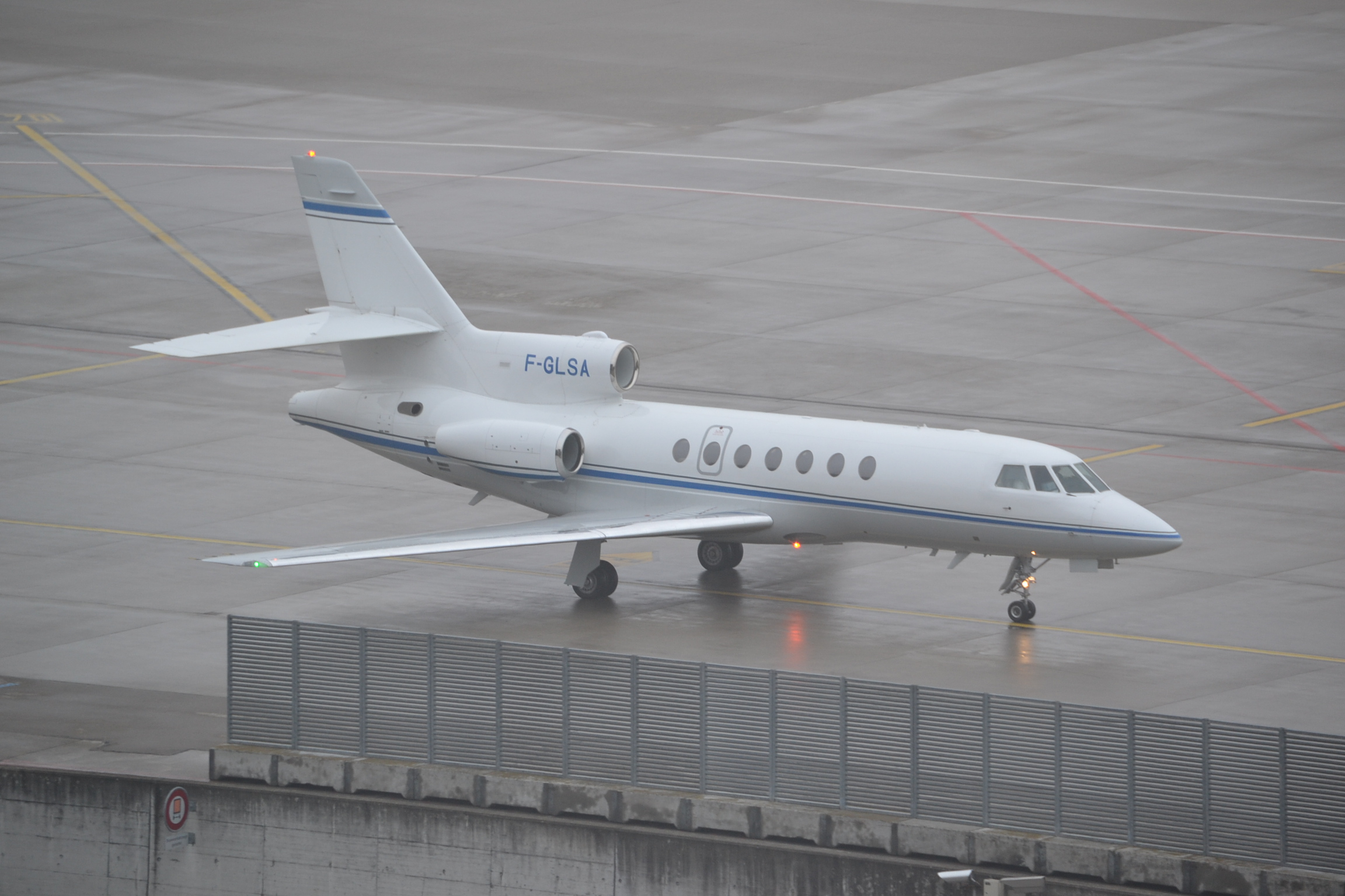 Dassault Falcon 50EX at Zurich-ZRH, 25/01/14.